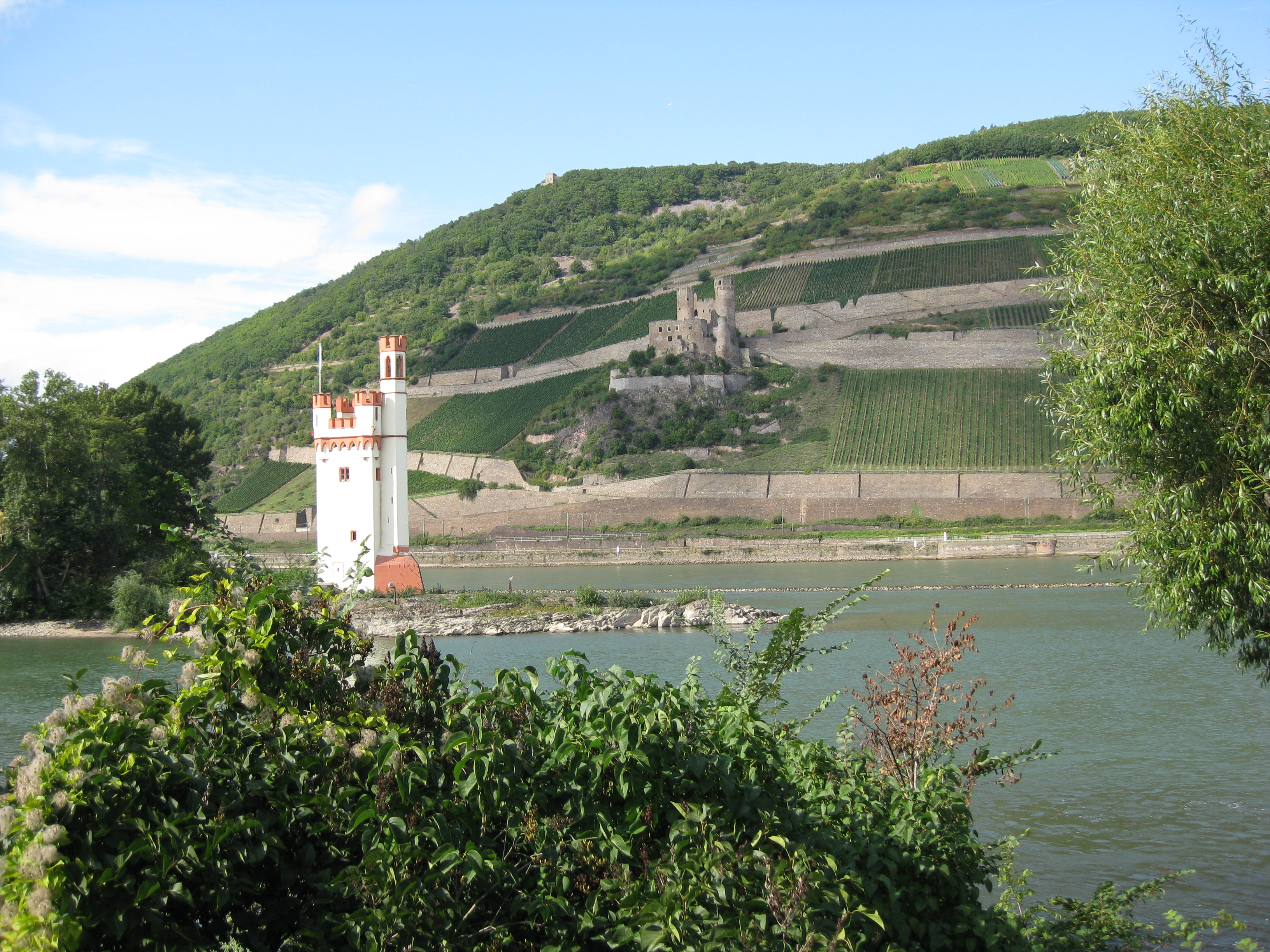 Blick von der Binger Gartenschau auf den Rhein mit Burgruine Ehrenfels und dem Mäuseturm